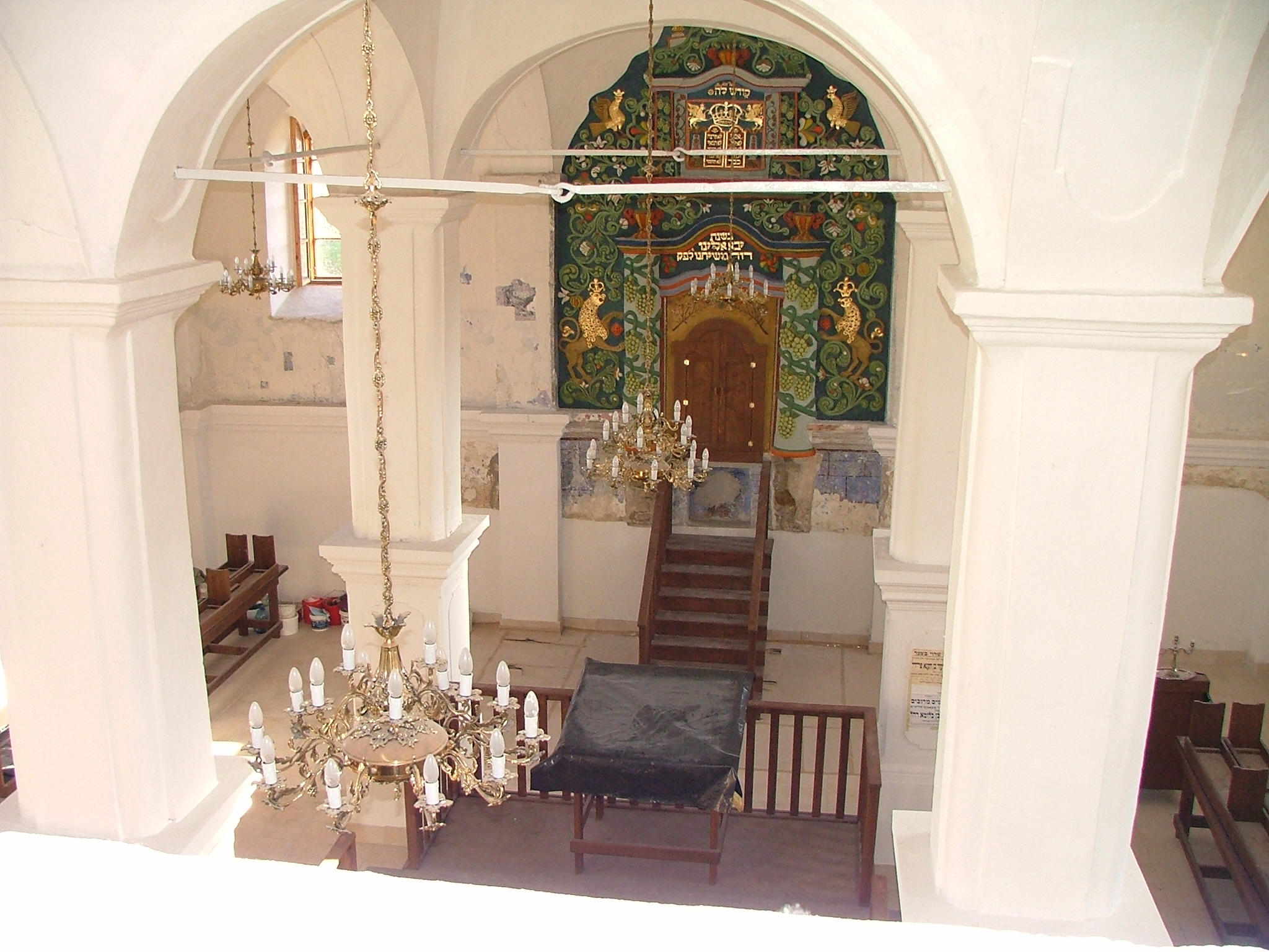 Synagogue of Bobowa, Poland